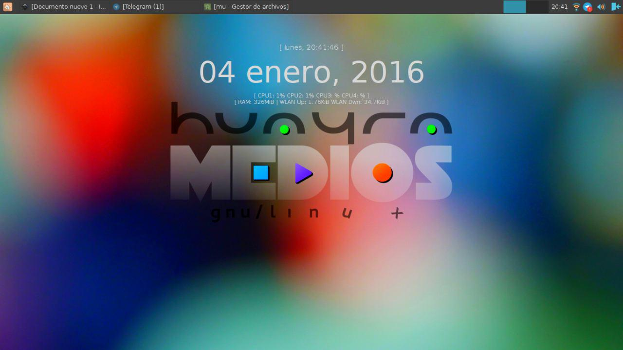 Captura de Pantalla